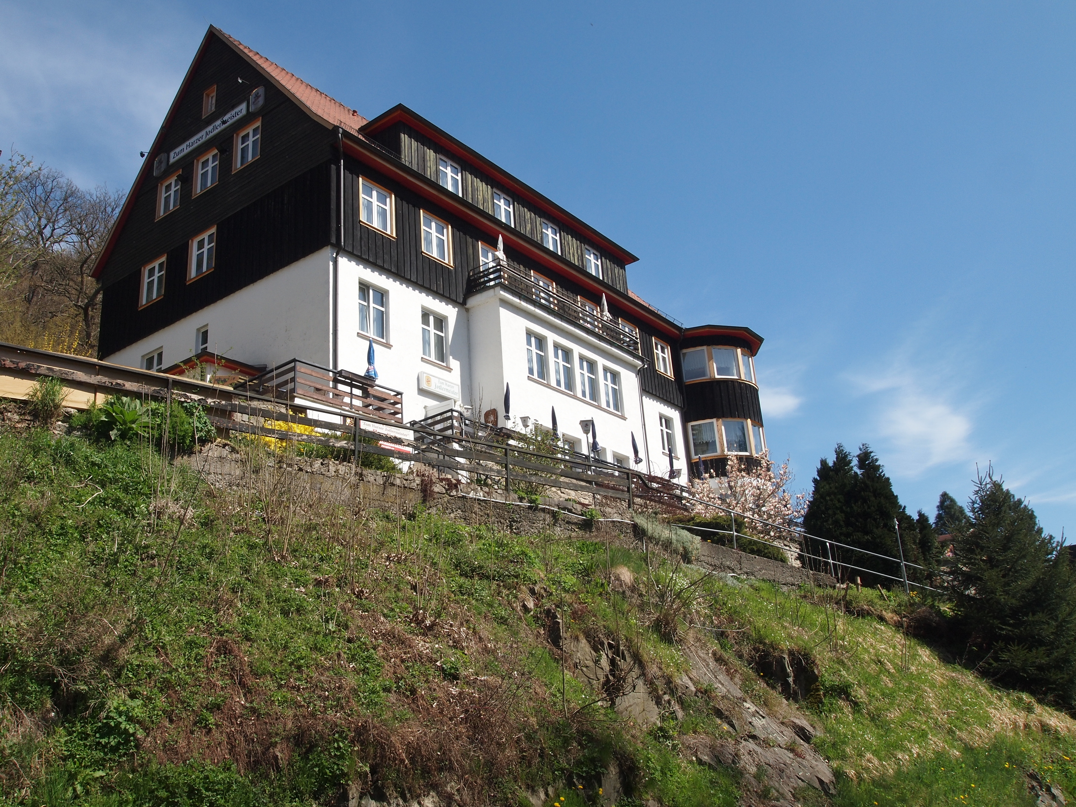 Altenbrak (Stadt Thale, Landkreis Harz; Sachsen-Anhalt) Pension und Restaurant "Zum Harzer Jodlermeister", Sankt Ritter 26a